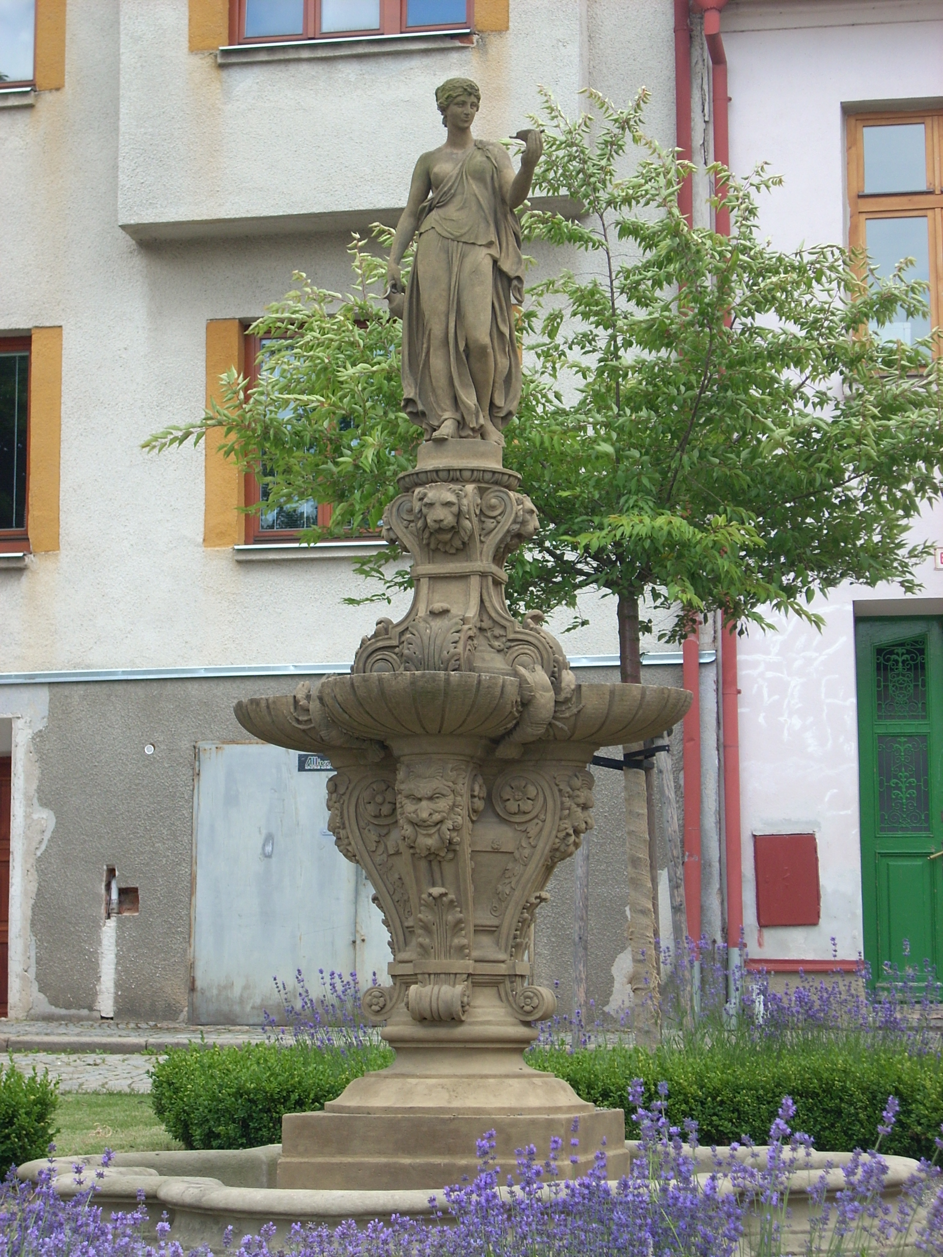 Polná - Fontána se sochou Hébé, Sezimovo náměstí